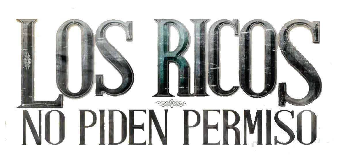 Logo de Los ricos no piden permiso, de El Trece, 2016.